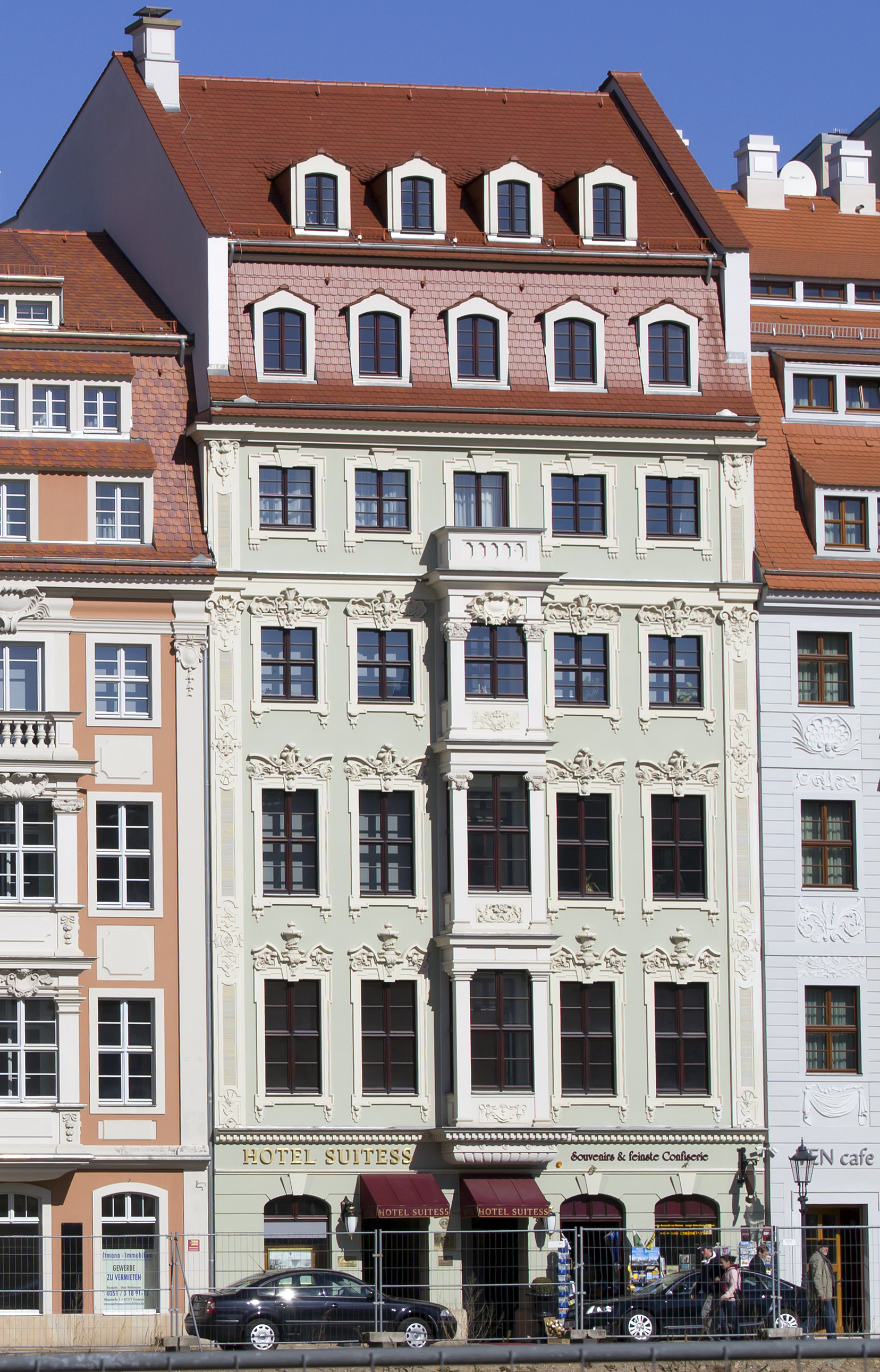 Haus Rampische Gasse 7 in Dresden. Leider ist das Haus ohne irgendwelche Bauzäune nicht zu fotografieren.